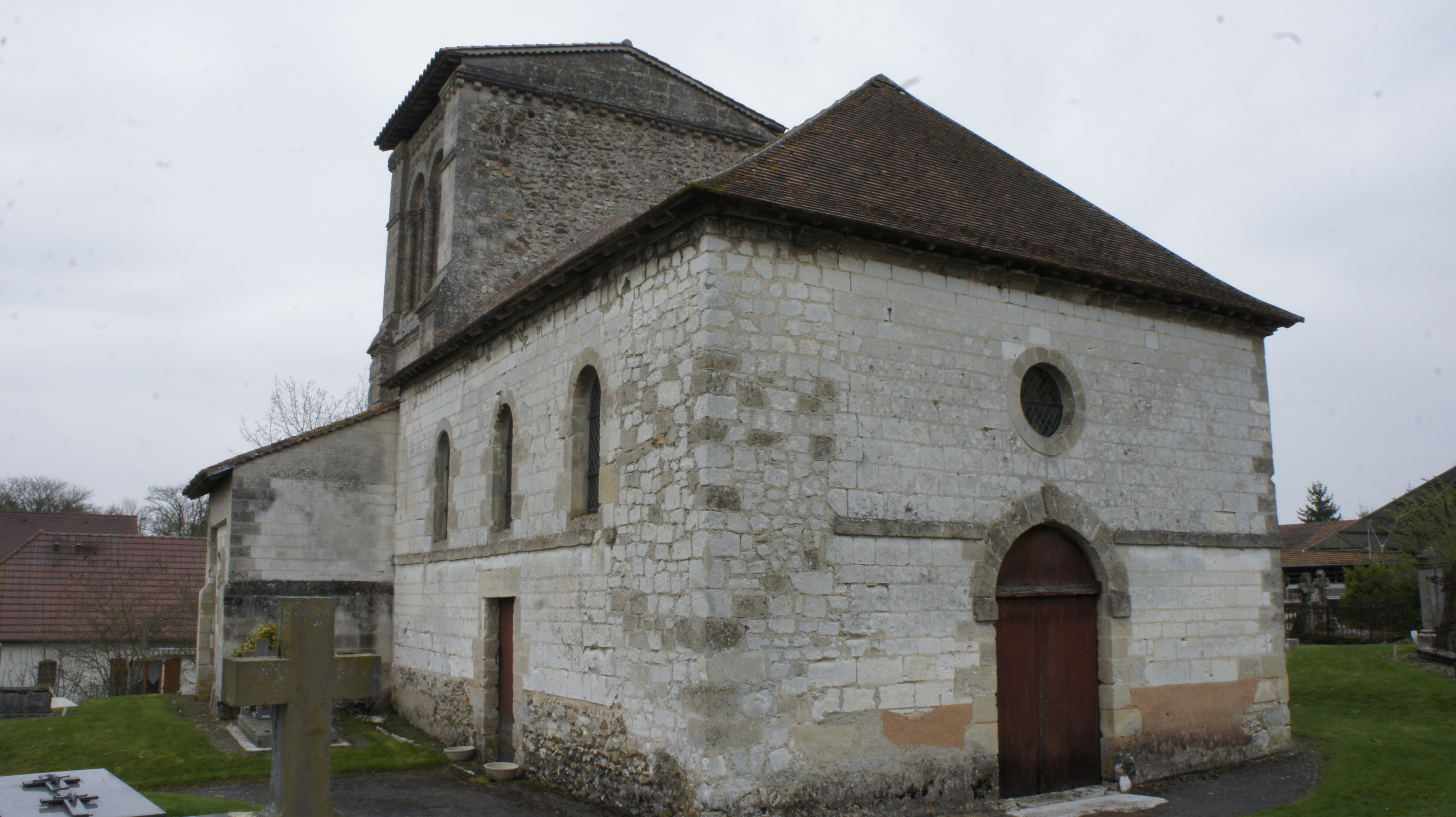 L'église portail occidental et côté nord .